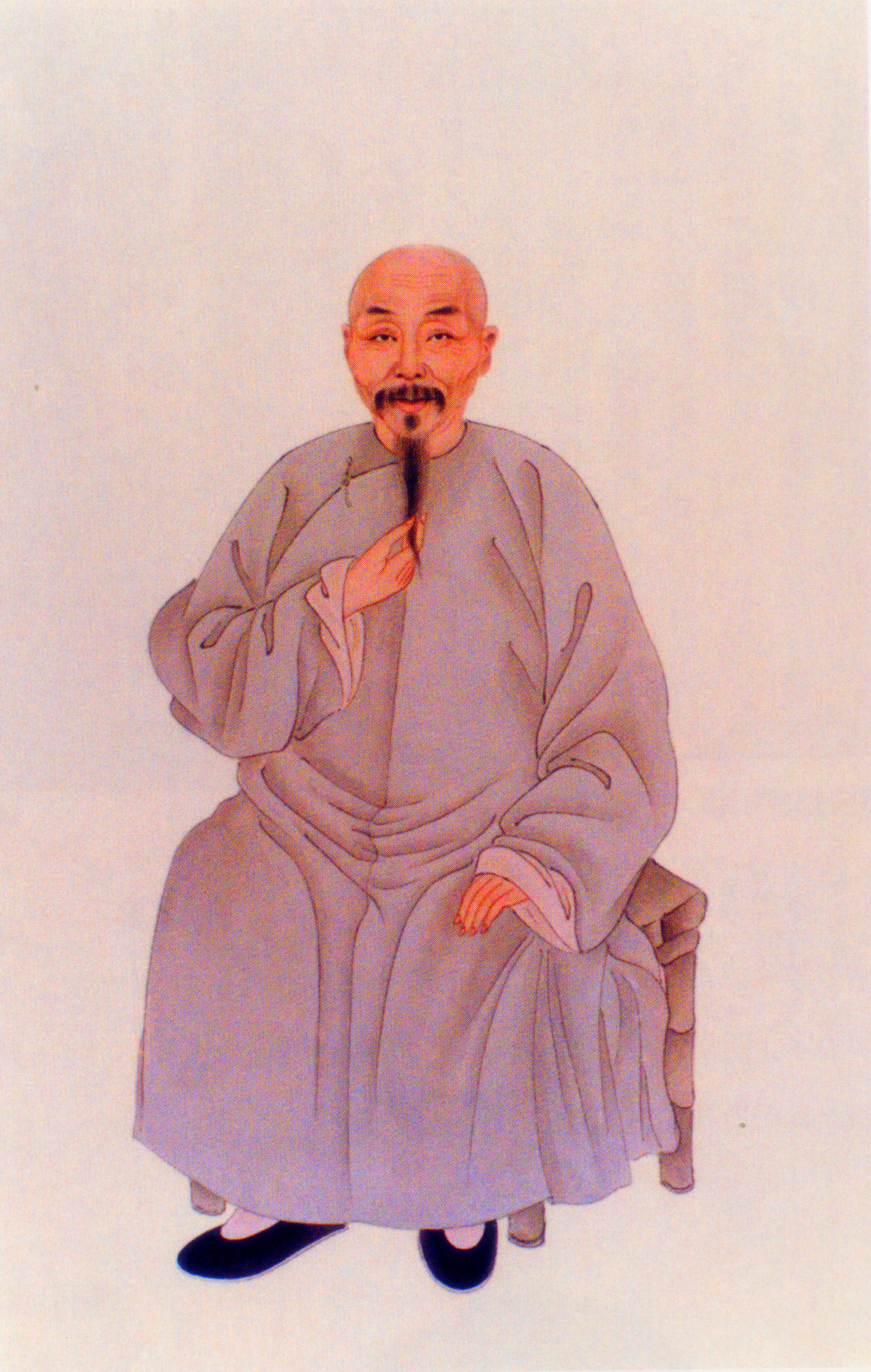 馮桂芬，清朝學者。Feng Guifen